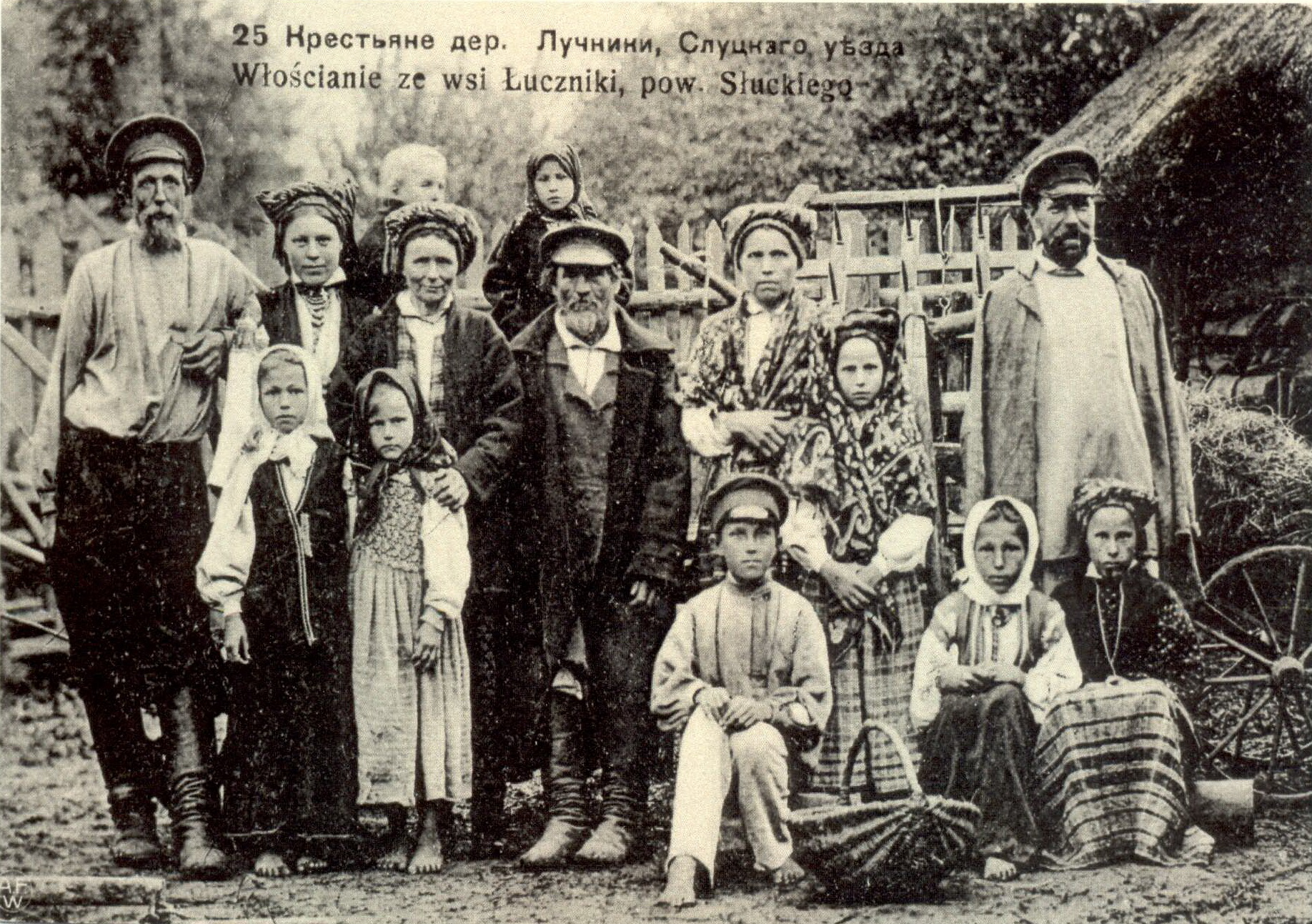 Беларуская (тарашкевіца): Слуцак. Сяляне вёскі Лучнікі Слуцкага павету.